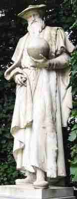 Statue Gerhard Mercators im Parc du Petit Sablon in Brüssel